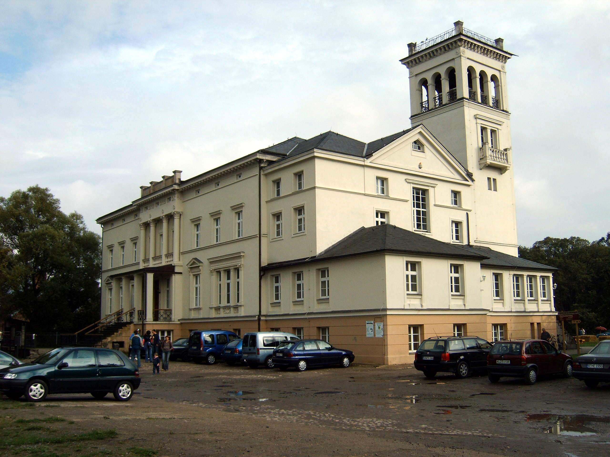 Schloss Kunrau, Sachsen-Anhalt, Deutschland Bild aufgenommen am 26.8.2006 von Olaf Meister